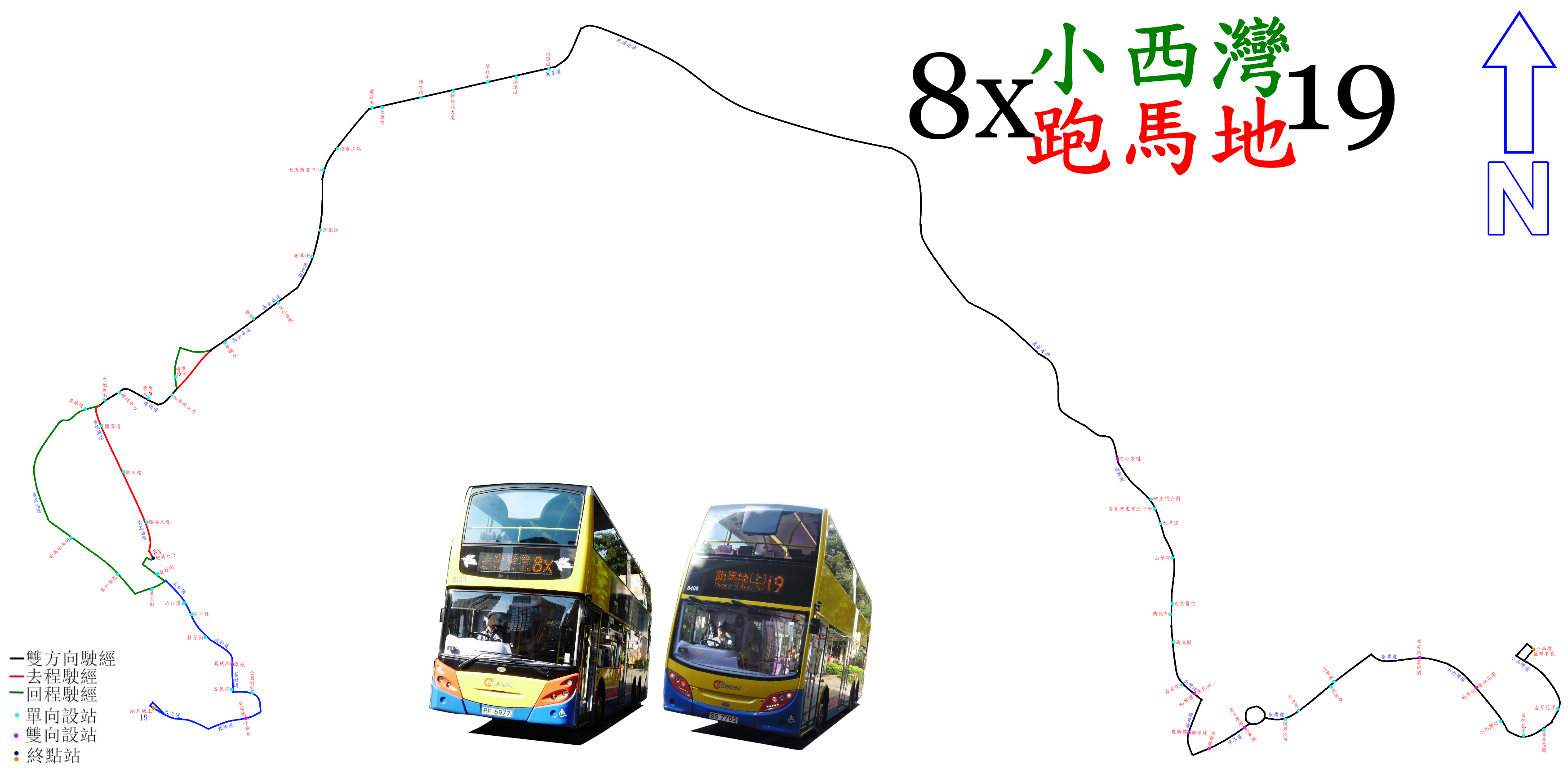 中文（香港）: 城巴8X線及19線的走線圖，藍線表示只有19線駛經